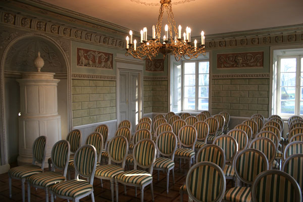 Dobrzyca. Sala balowa, widok współczesny